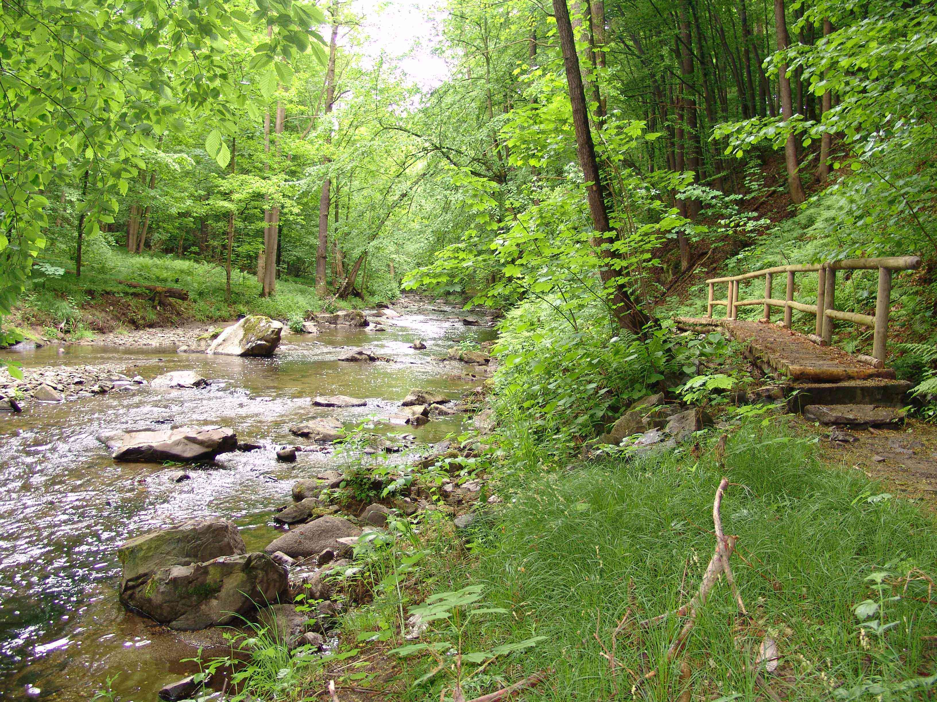 Löbauer Wasser in der Goergewitzer Skala